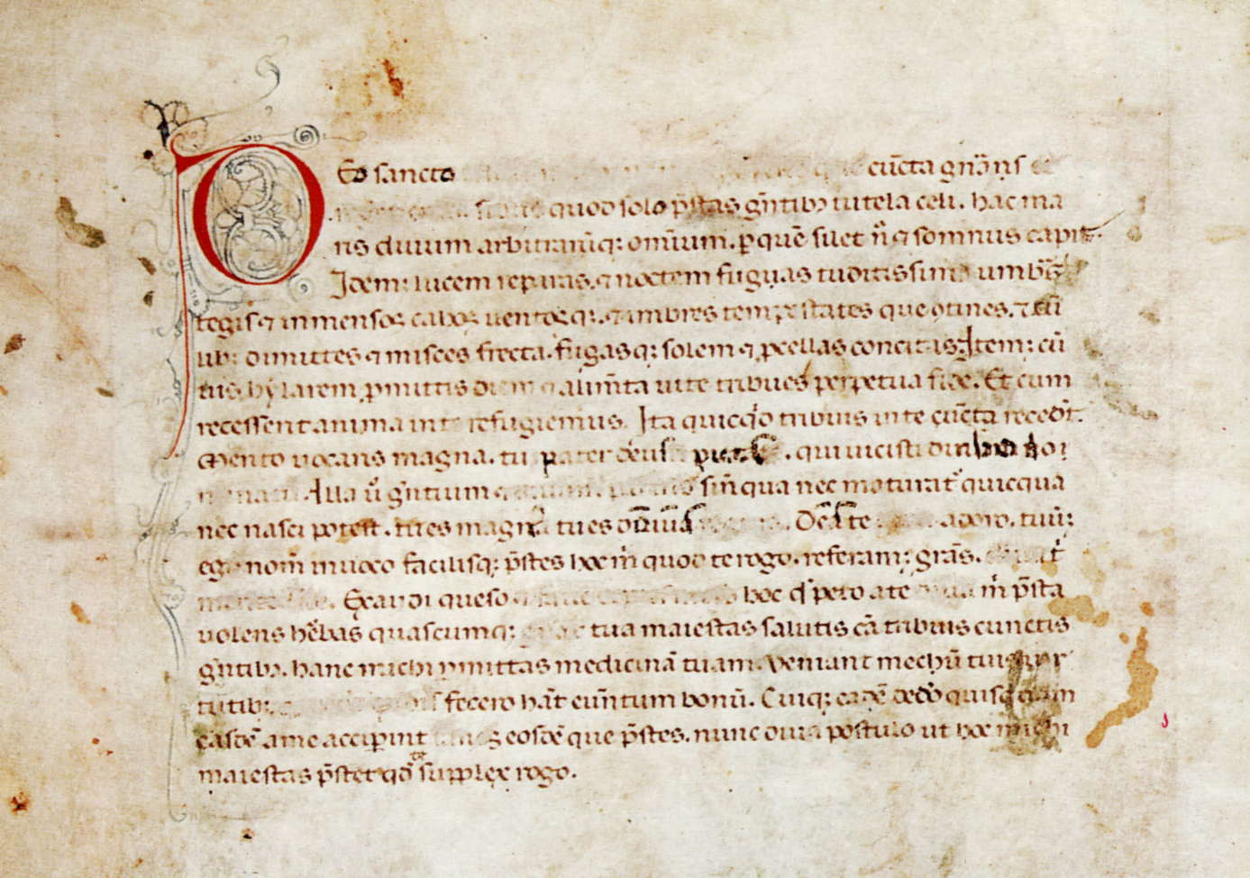 Anrufungsgedicht an die göttliche Mutter Erde. Version mit späteren christlichen Korrekturen (Medicina antiqua, Codex Vindobonensis 93, fol. 9 verso)